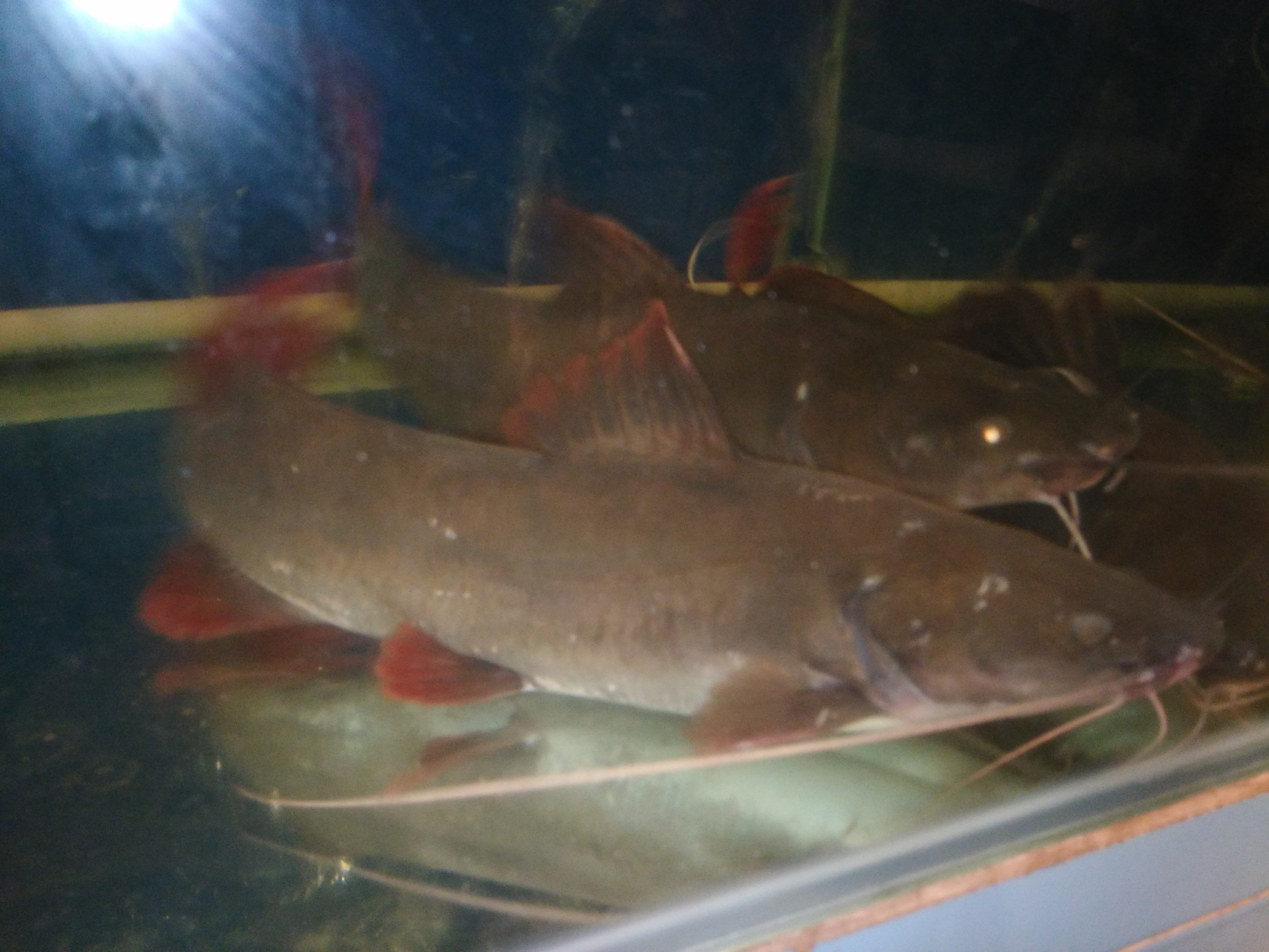 Hình tự chụp bằng máy ảnh cá nhân về một đàn cá lăng đuôi đỏ ở một nhà hàng thuộc quận Gò Vấp